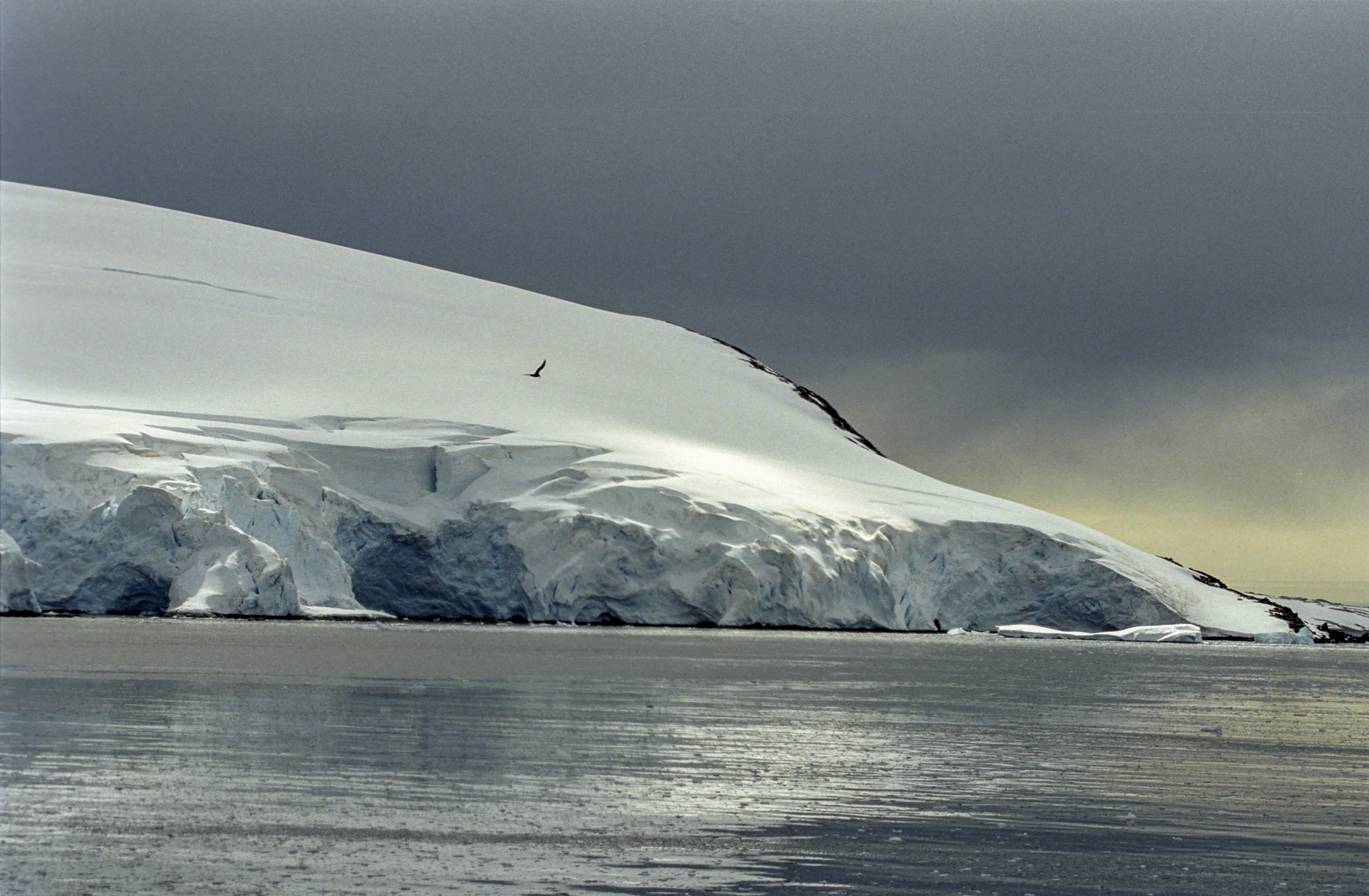 Antarctica, landscape